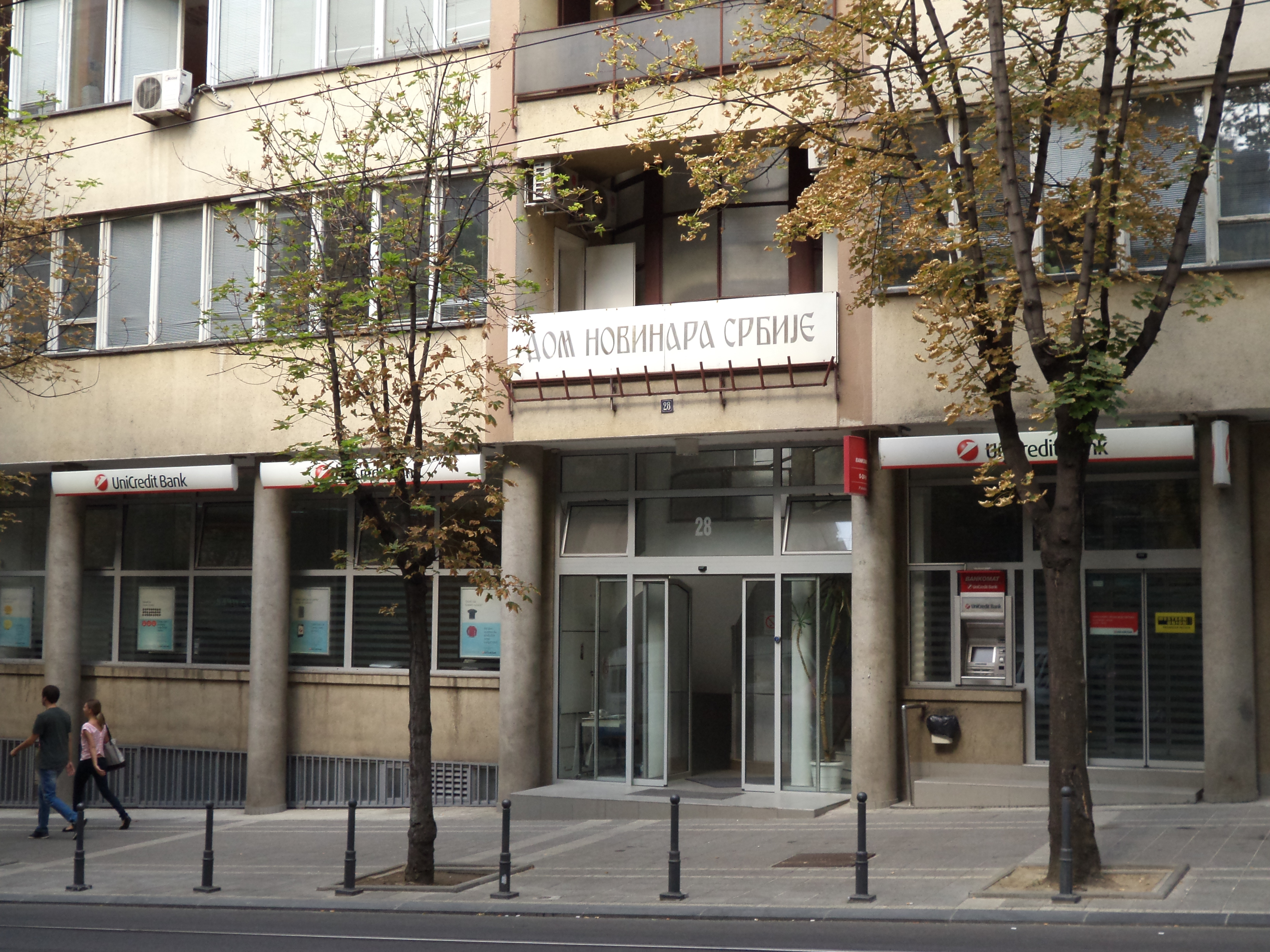 Удружење новинара Србије, данас